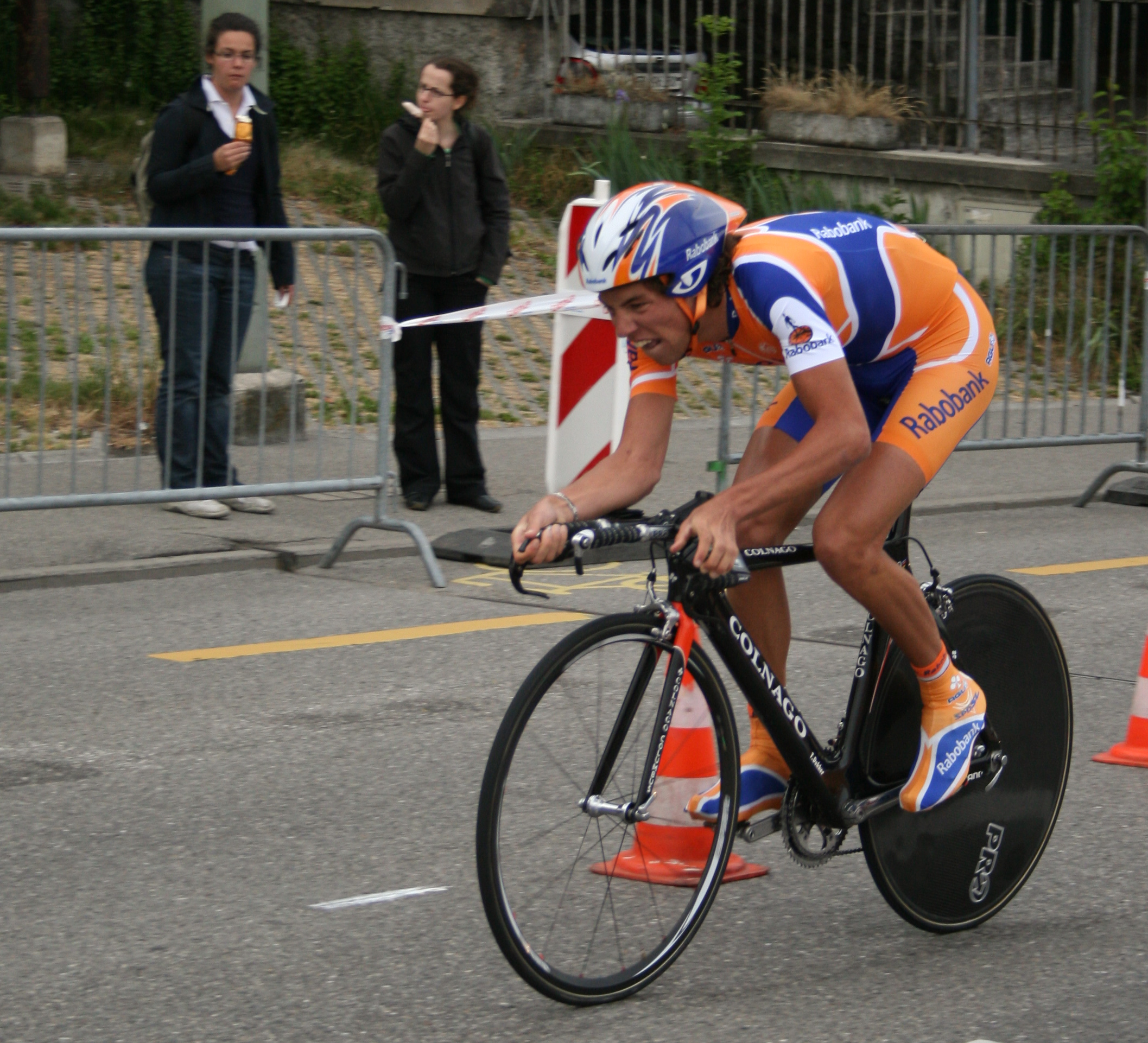 Thomas Dekker prologue du Tour de Romandie 2007